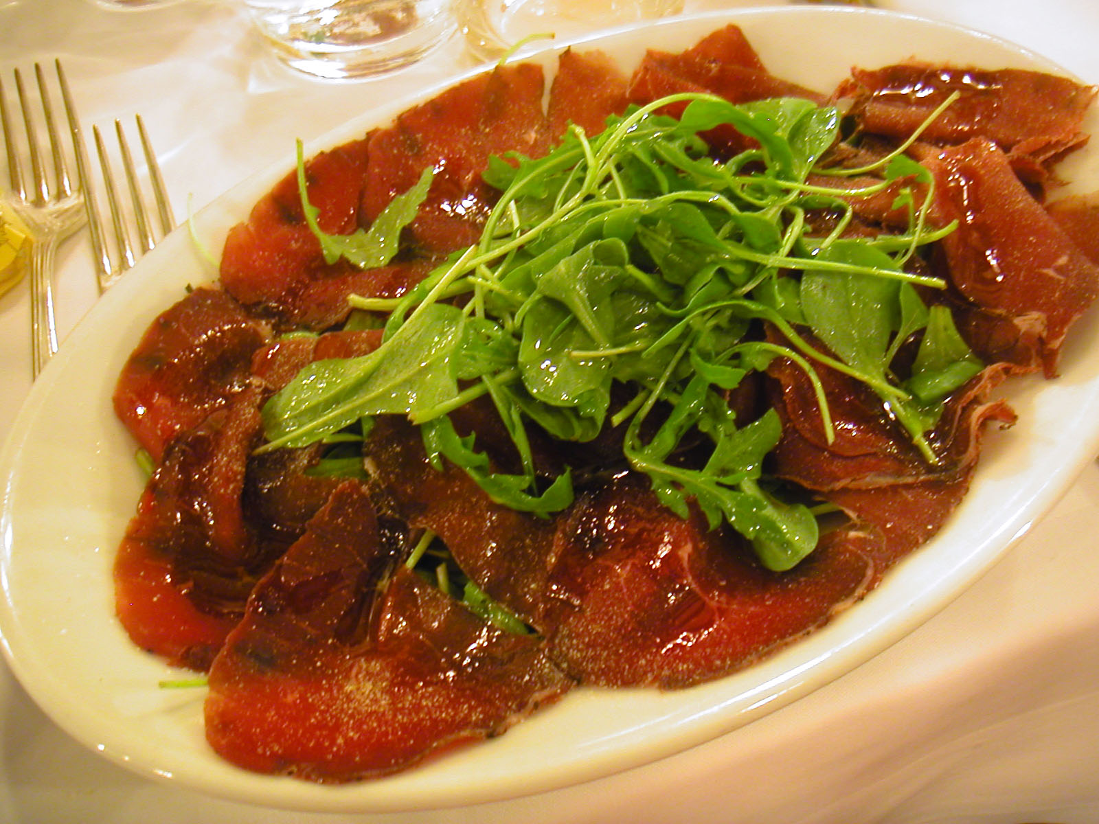 Bresaola